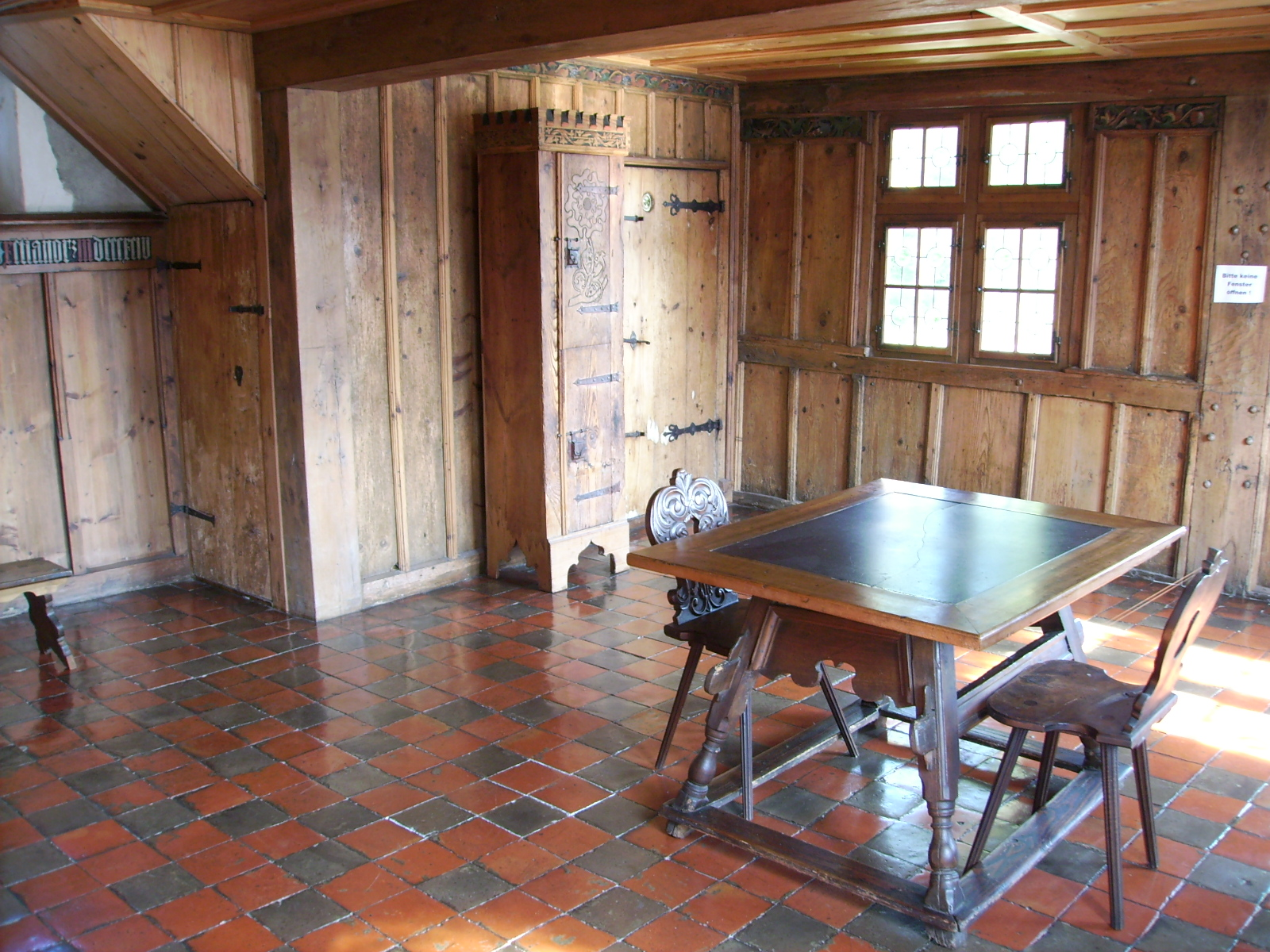 Das Kloster St. Georgen war eine Benediktinerabtei in Stein am Rhein im Kanton Schaffhausen, Schweiz. Schutzpatrone des Klosters waren St. Georg und St. Cyrill. Es handelt sich um eine der am besten erhaltenen mittelalterlichen Klosteranlagen der Schweiz.